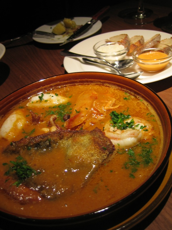 Suquet de peix et son persil